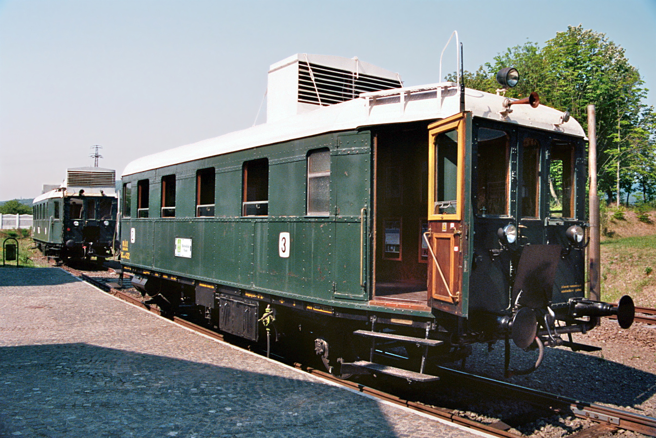 Szentendre (Skanzen): MÁV-Baureihe BCmot 390 als Museumsbahn im Szentendrei Néprajzi Múzeum.